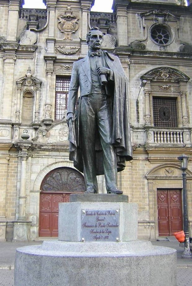 Estatua de Francisco de Paula Santander, ubicado en la Plazuela San Ignacio, Medellín, Colombia